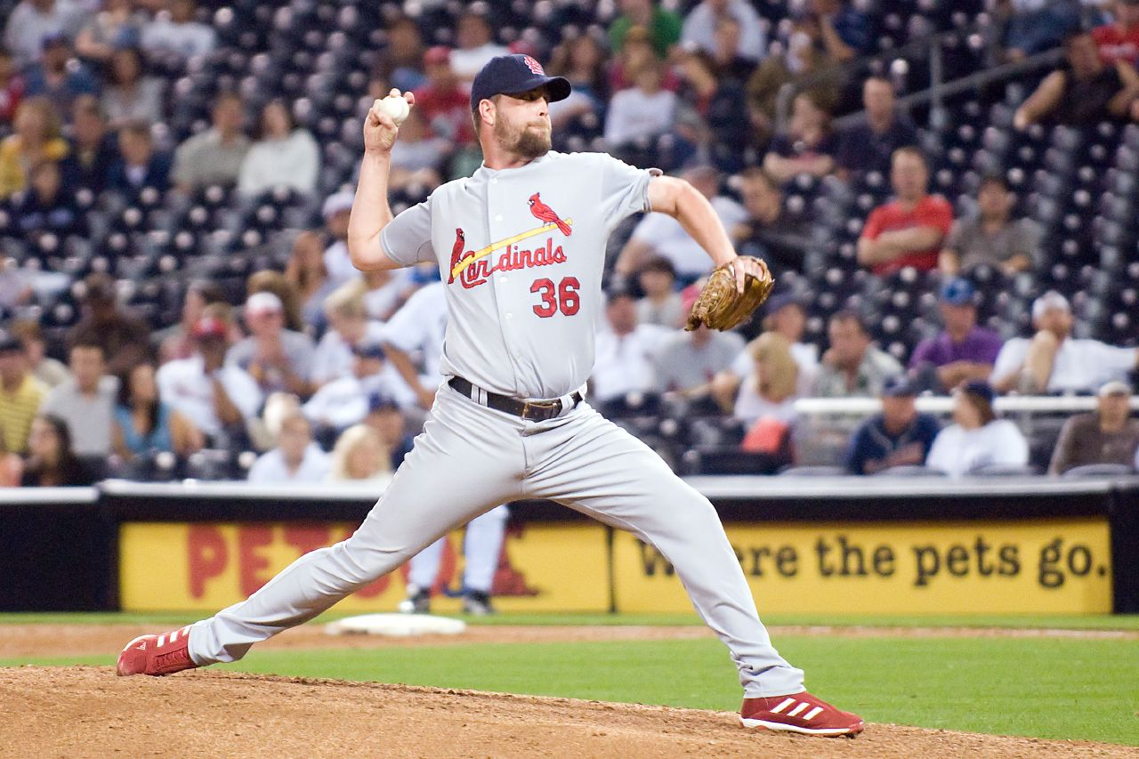 Russ Springer